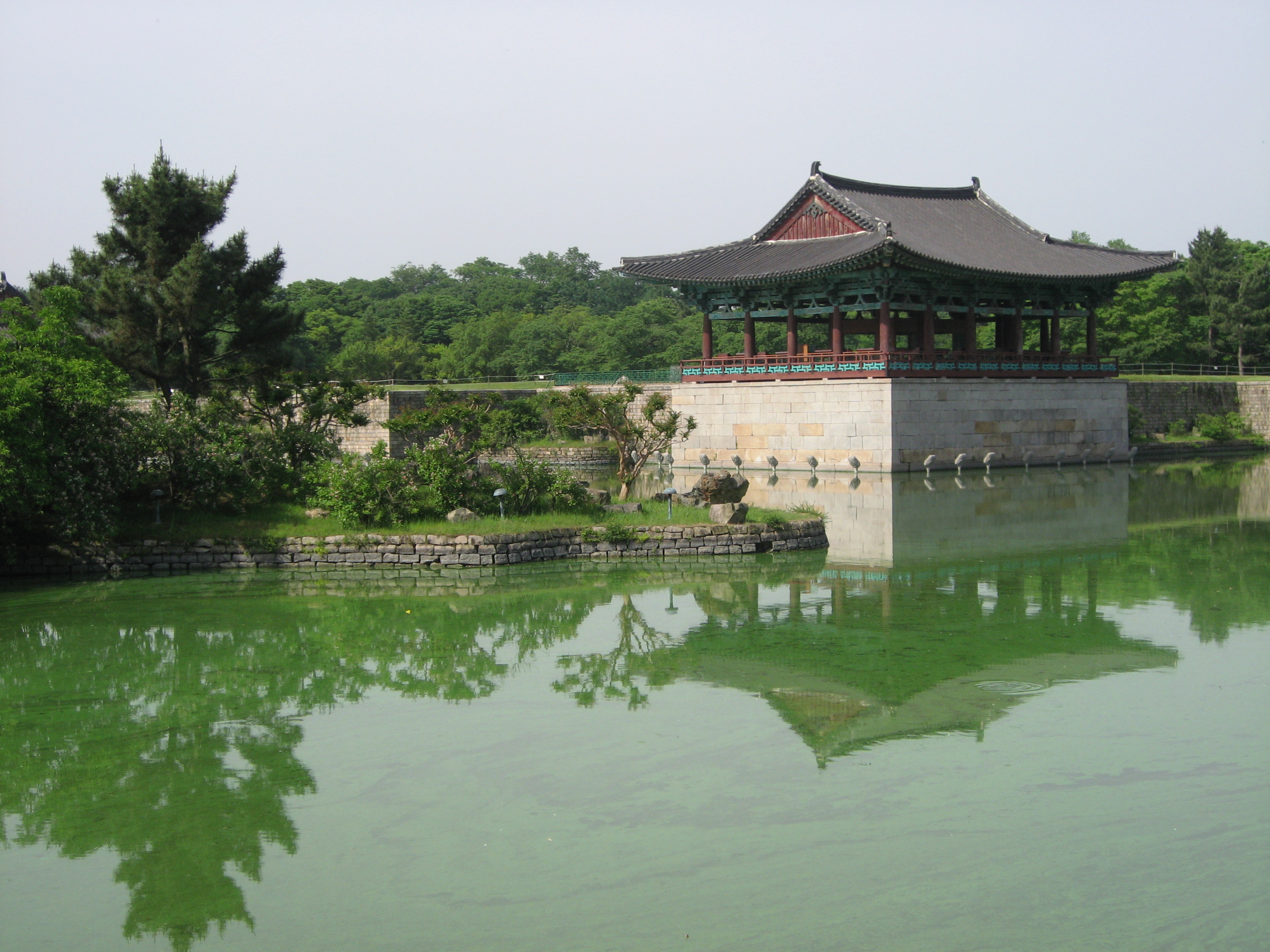 Anapji, Gyeongju, South Korea